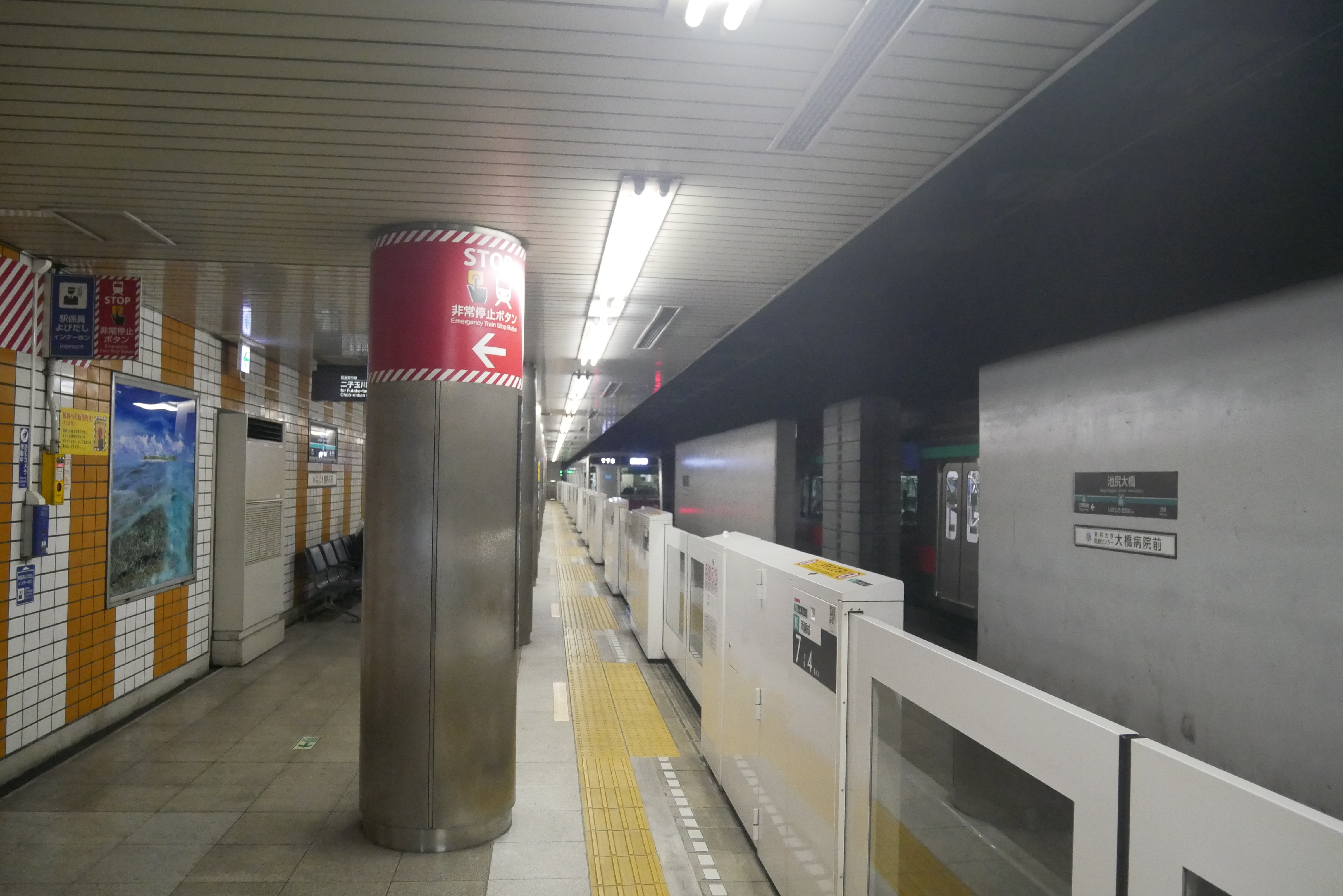 Ikejiri-Ōhashi Station platform (池尻大橋駅のホーム)